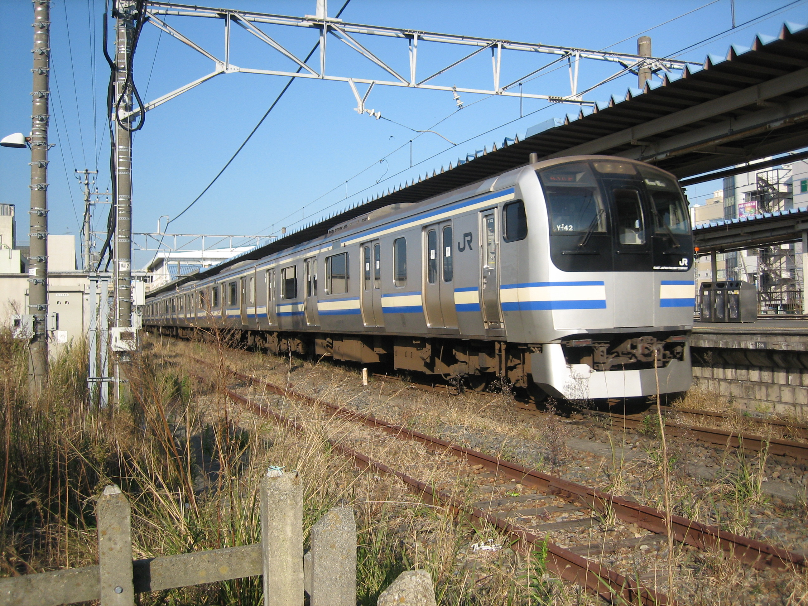 木更津駅を発車した総武線快速